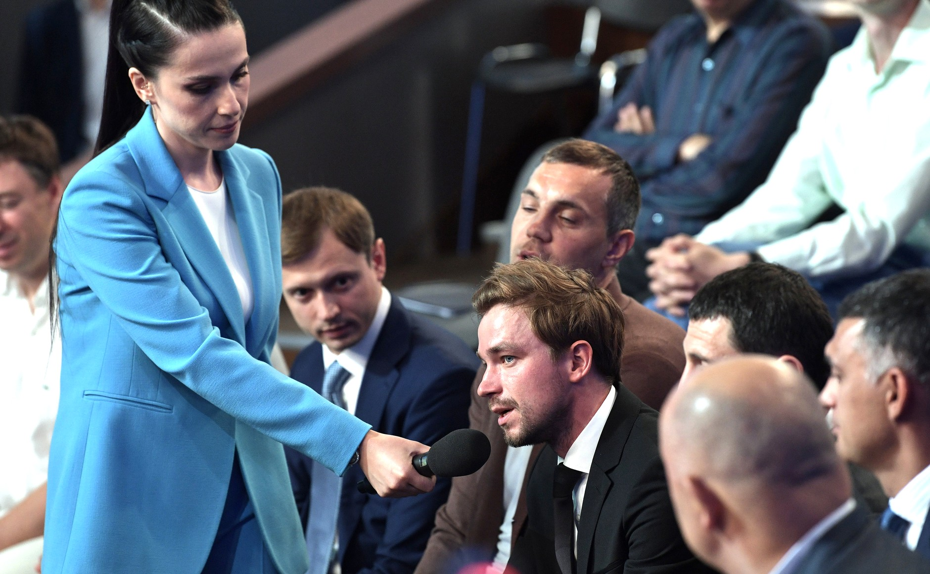 «Прямая линия с Владимиром Путиным»